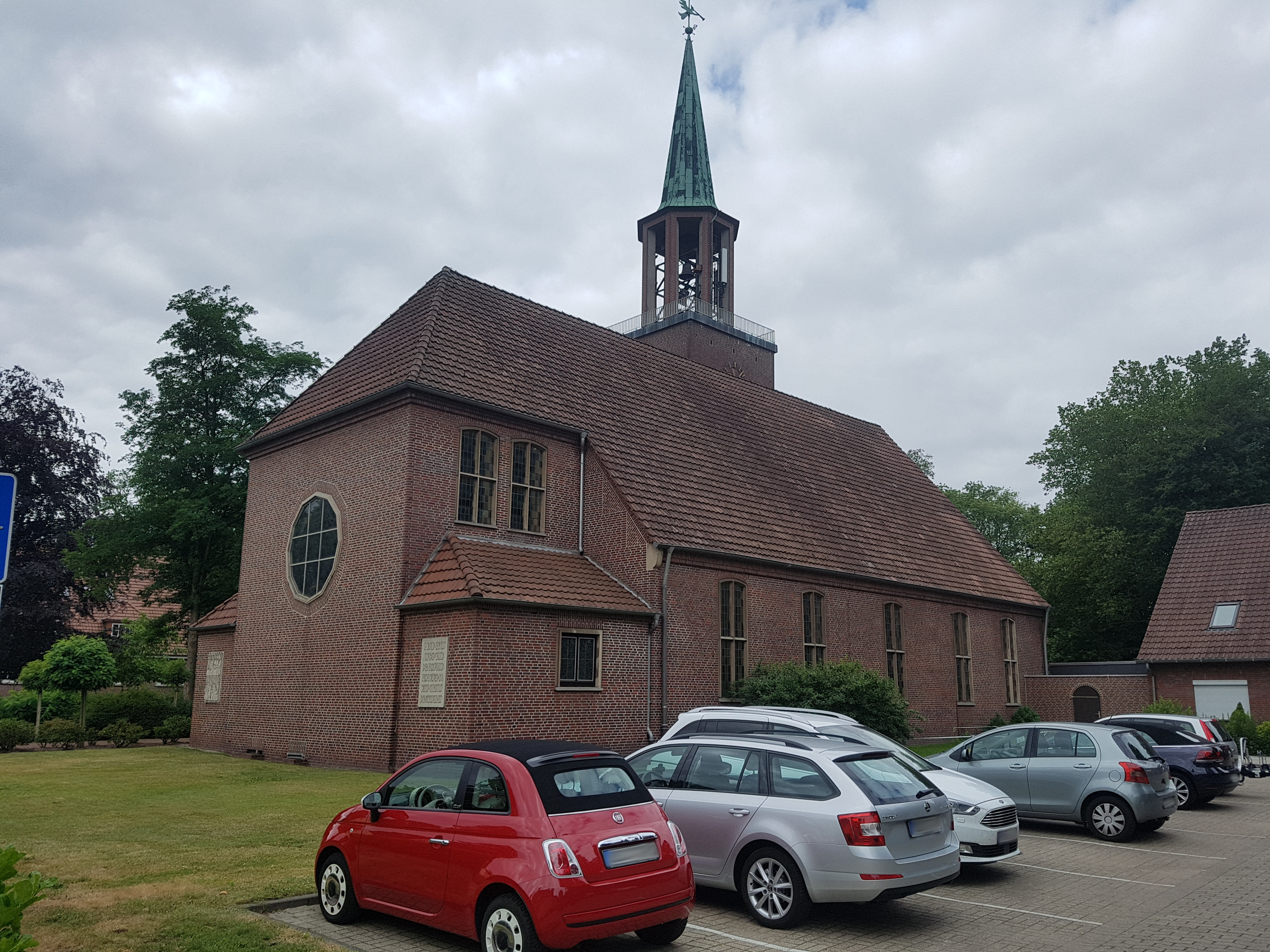 Kark To de twölv Apostels in Demost